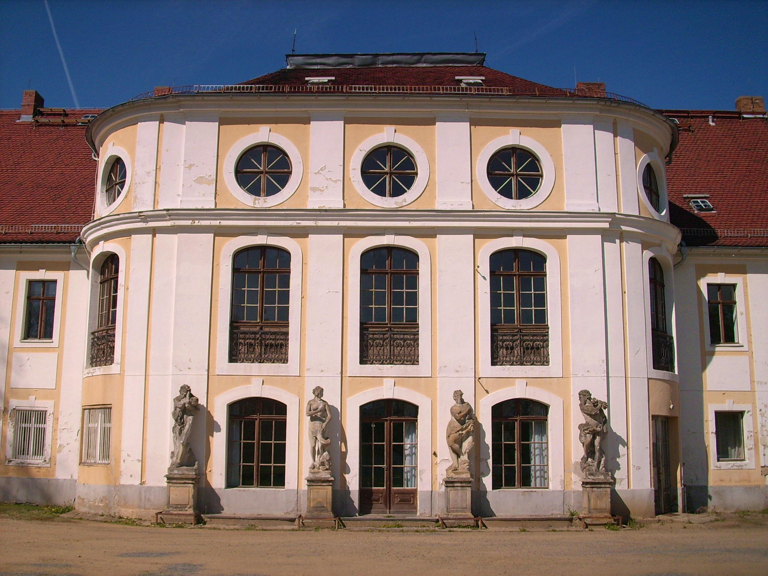 Schloss in Königswartha